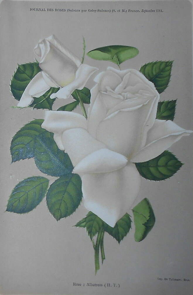 Rosa 'Albatross' (William Paul 1908), hybride de thé, chromolithographie parue dans le numéro de septembre 1911 du Journal des roses.